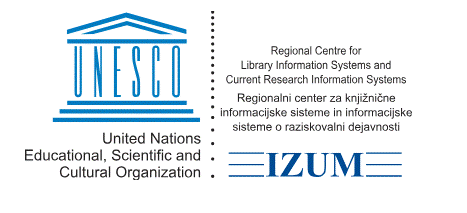 Status regionalnega centra UNESCO